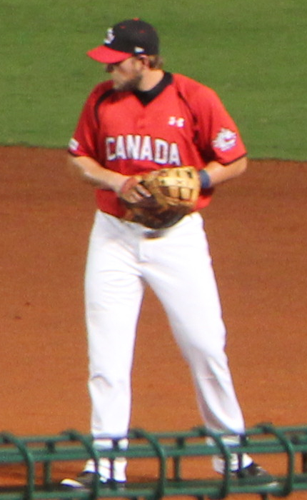 Jordan Lennerton